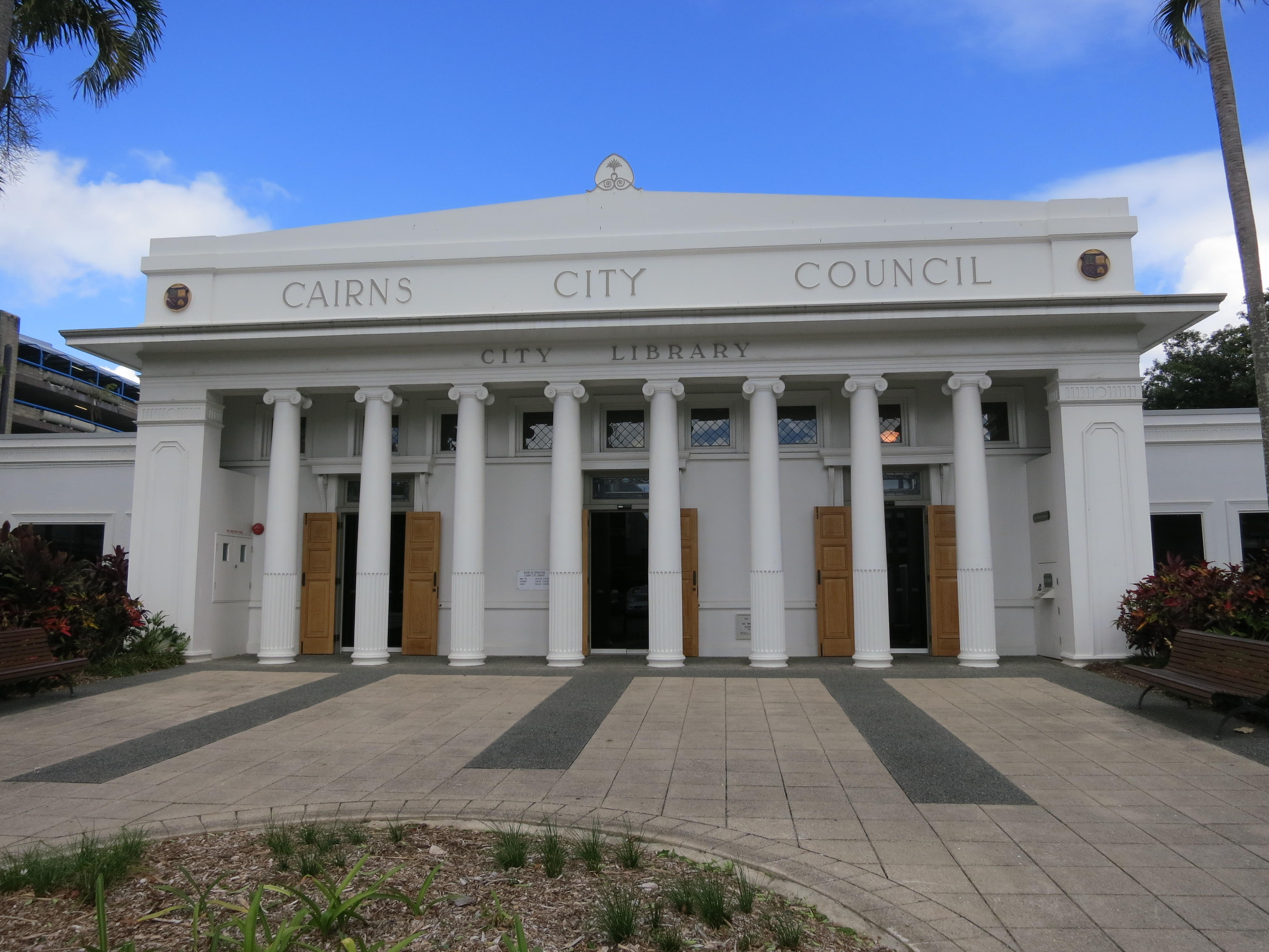 City Library, Cairns, North Queensland, Australia